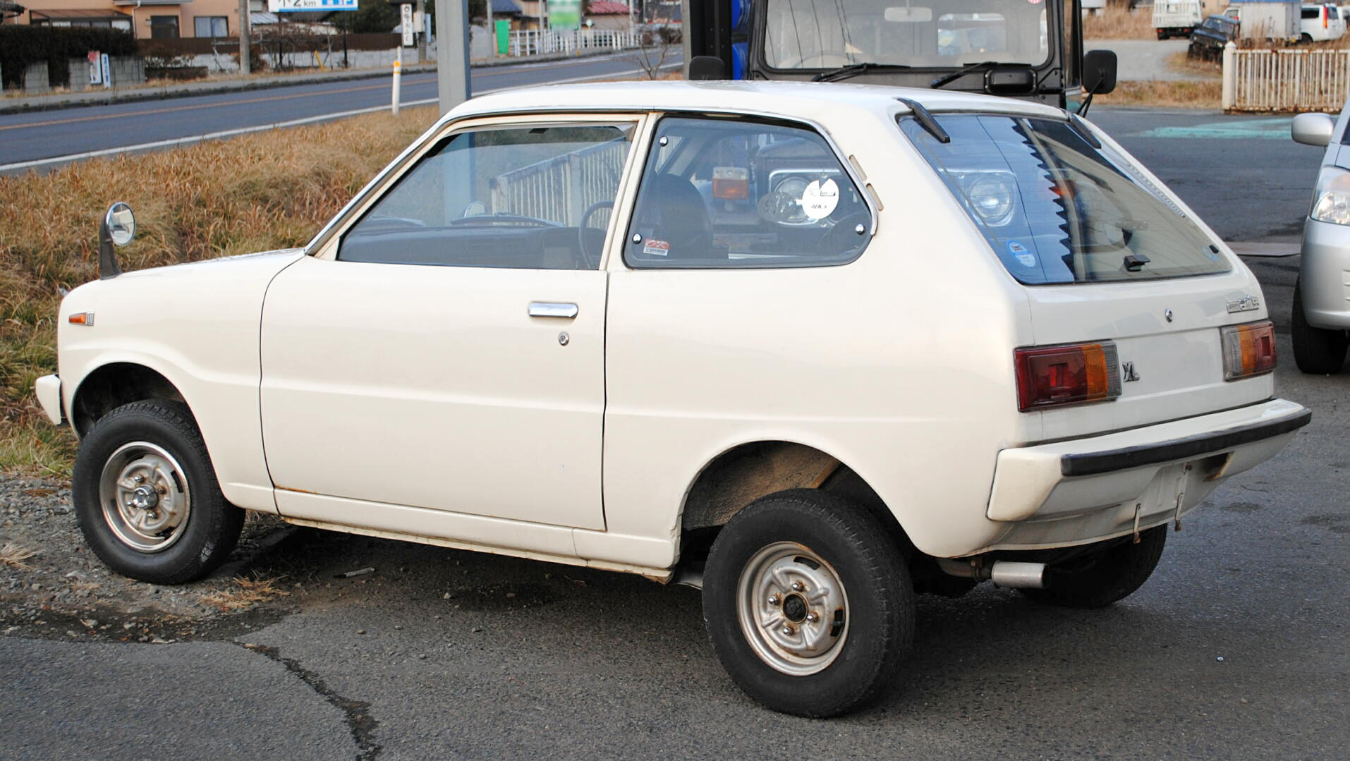 三菱・ミニカ（4代目）